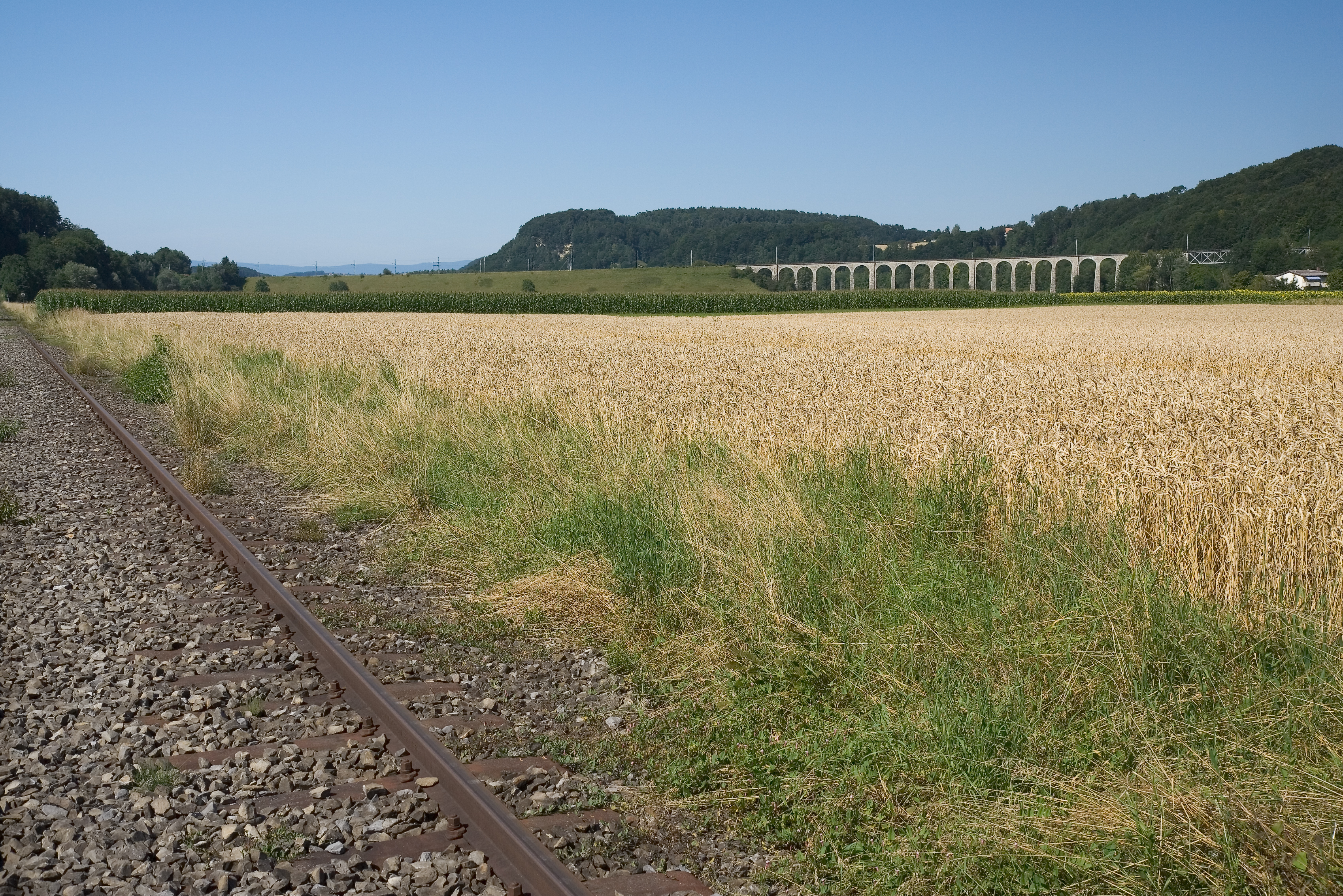 Links das Gleis der stillgelegten Sensetalbahn, hinten das Gümmenenviadukt der Bern–Neuenburg-Bahn